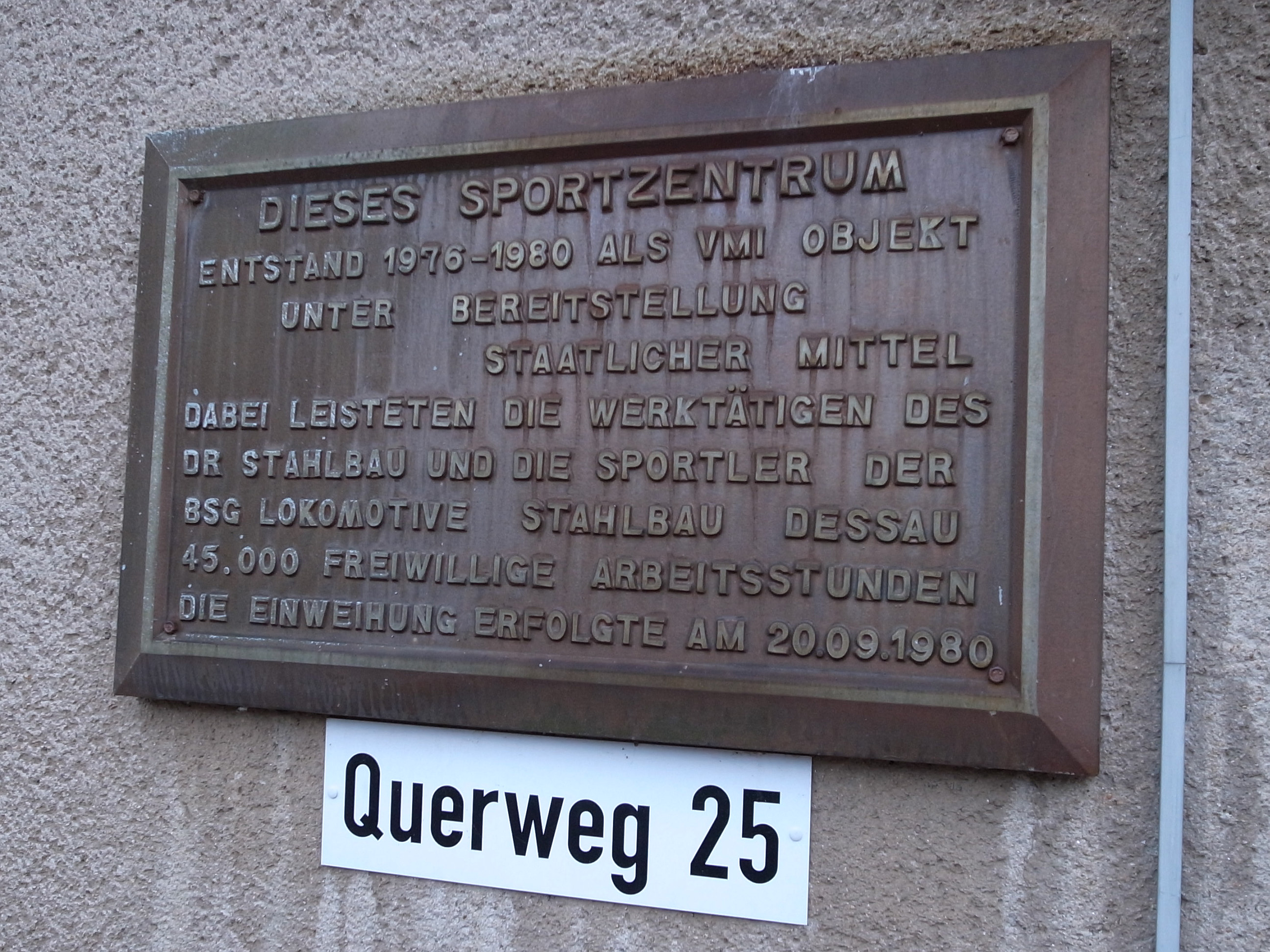 VMI Objekt Sportplatz Stahlbau Dessau